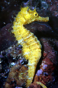 Hippocampus c